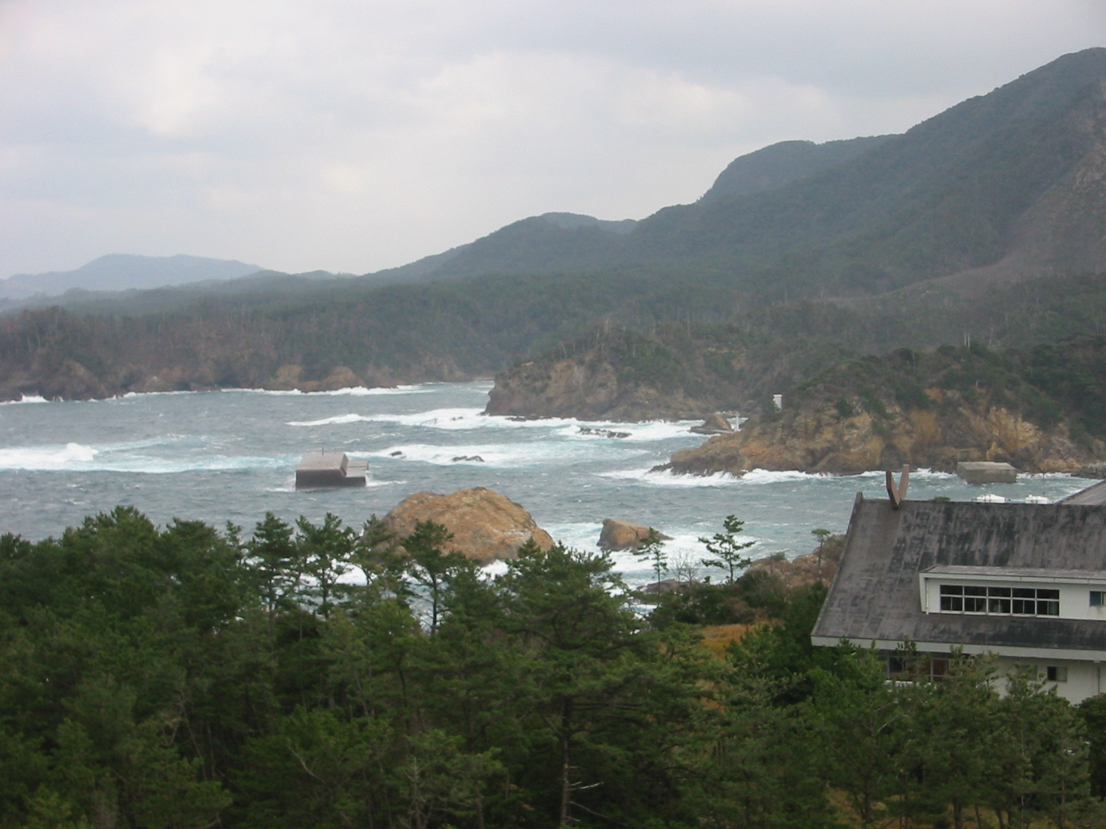 日御碕灯台 から望む